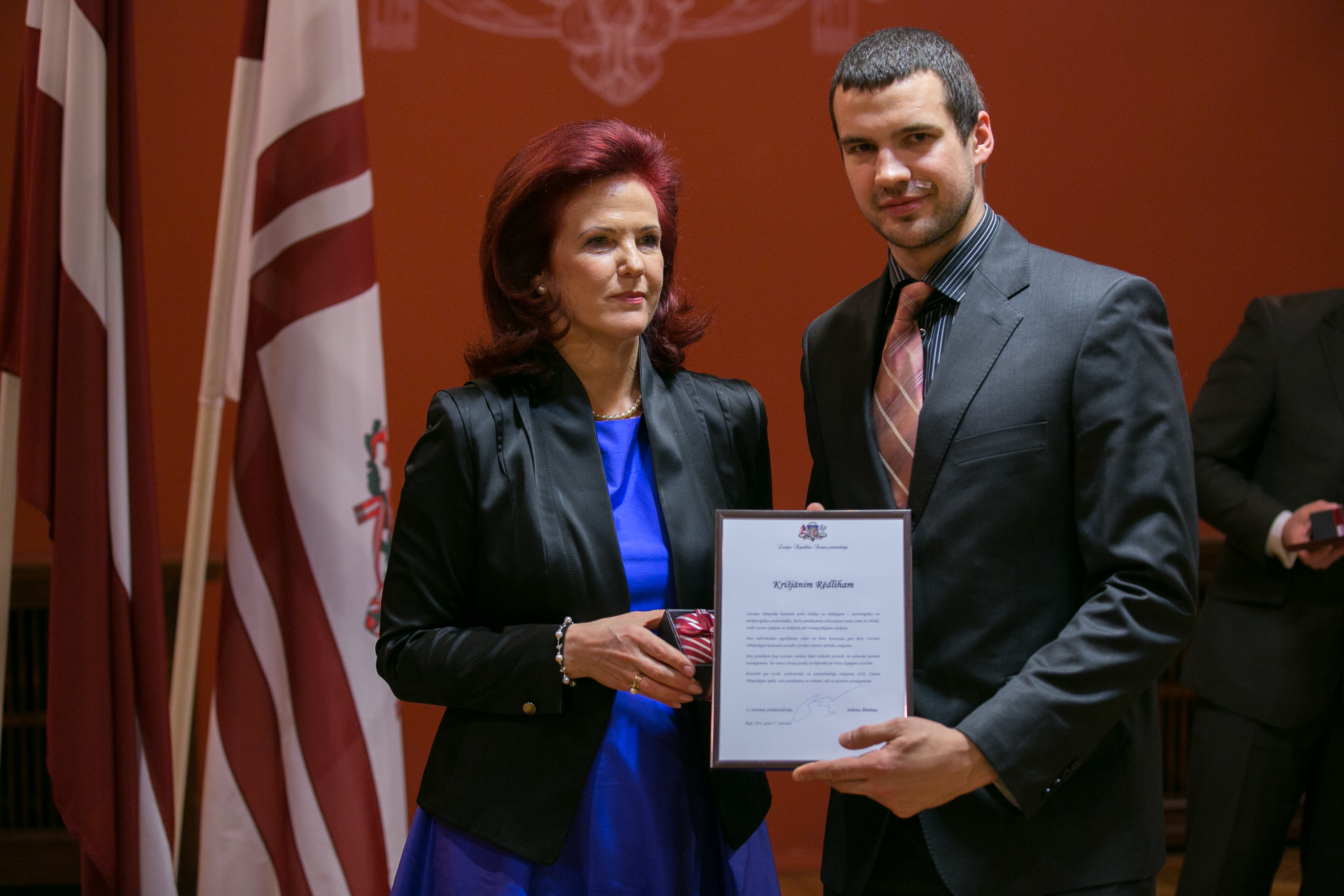 2014.gada 27.februāris. Saeimas priekšsēdētāja Solvita Āboltiņa tiekas ar Latvijas olimpisko komandu XXII Ziemas olimpiskajās spēlēs Sočos. Foto: Ernests Dinka, Saeimas Kanceleja Izmantošanas noteikumi: saeima.lv/lv/autortiesibas Solvita Āboltiņa tiekas ar Latvijas olimpisko komandu XXII Ziemas olimpiskajās spēlēs Sočos.